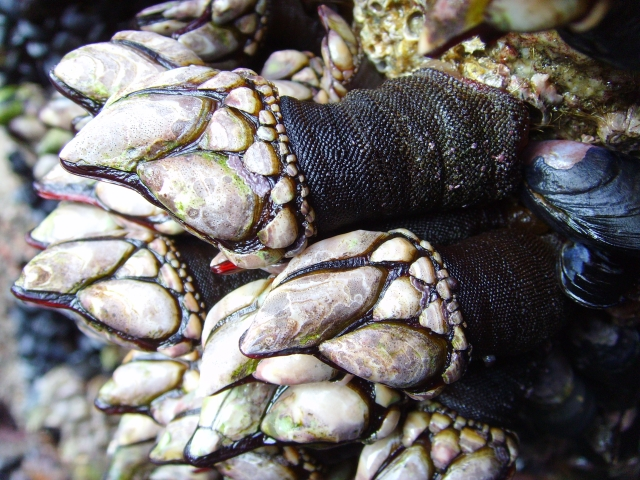 Pollicipes pollicipes, Cap Sizun (Finistère, France)